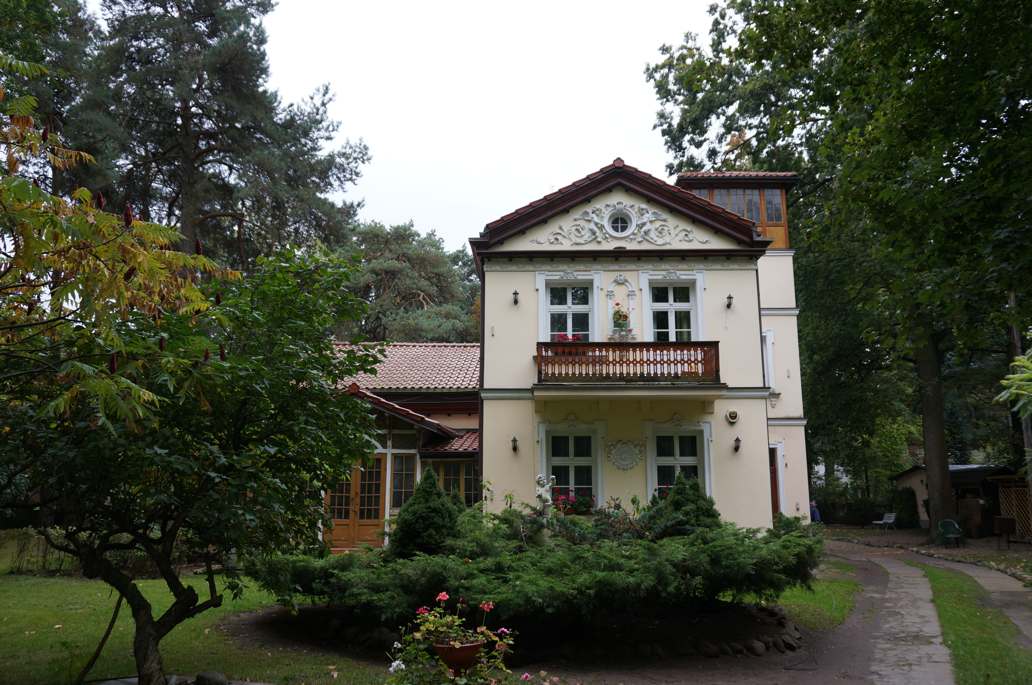 Konstancin-Jeziorna, willa SZAROTKA (d. STOKROTKA), 1914